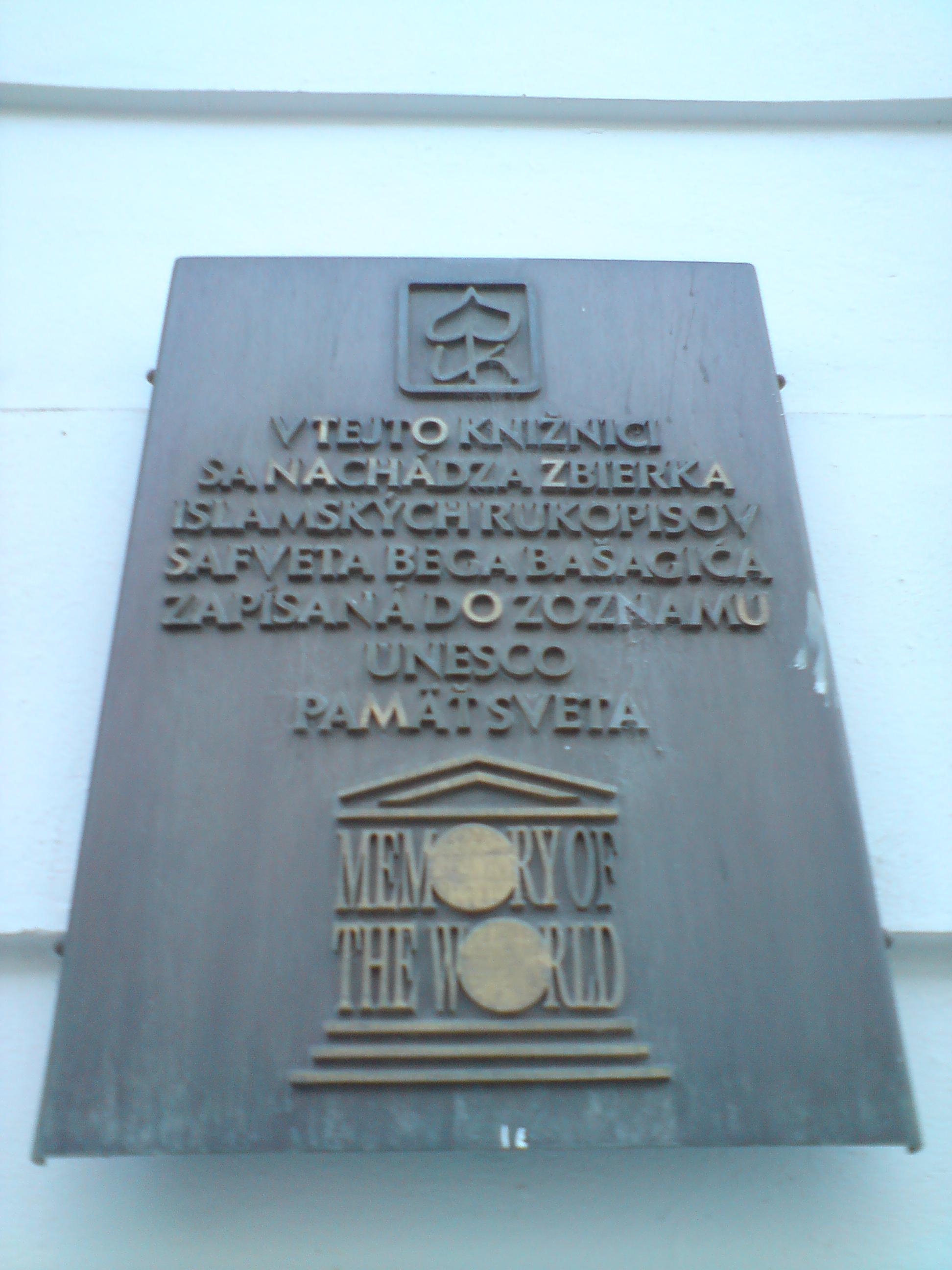 Palác Uhorskej kráľovskej komory